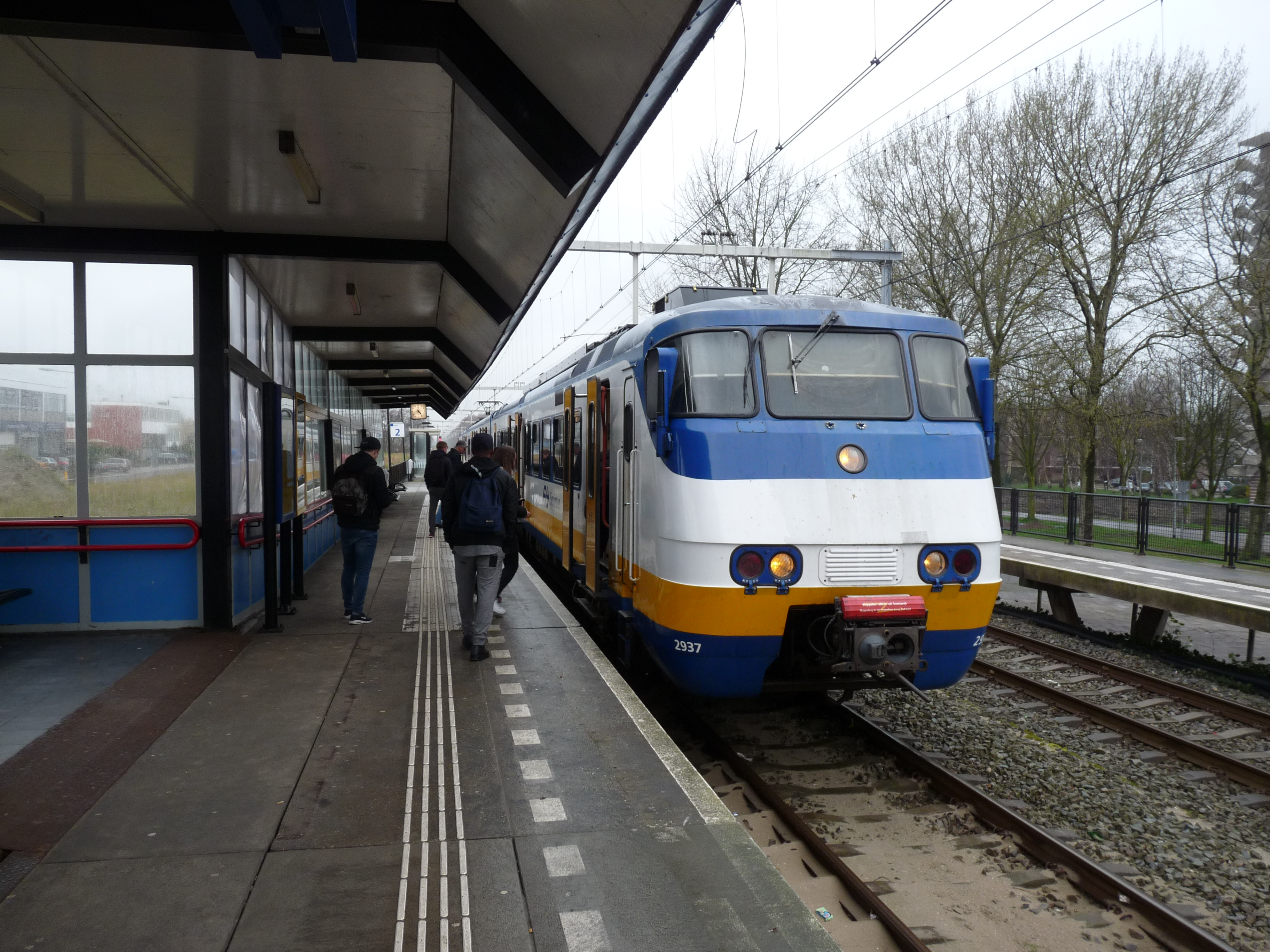 Sprinter in Vlaardingen West